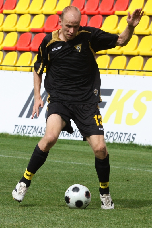 Gediminas Paulauskas